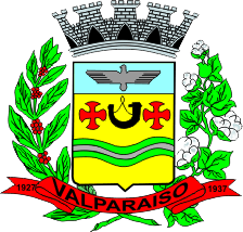 Brasão da Cidade de Valparaíso